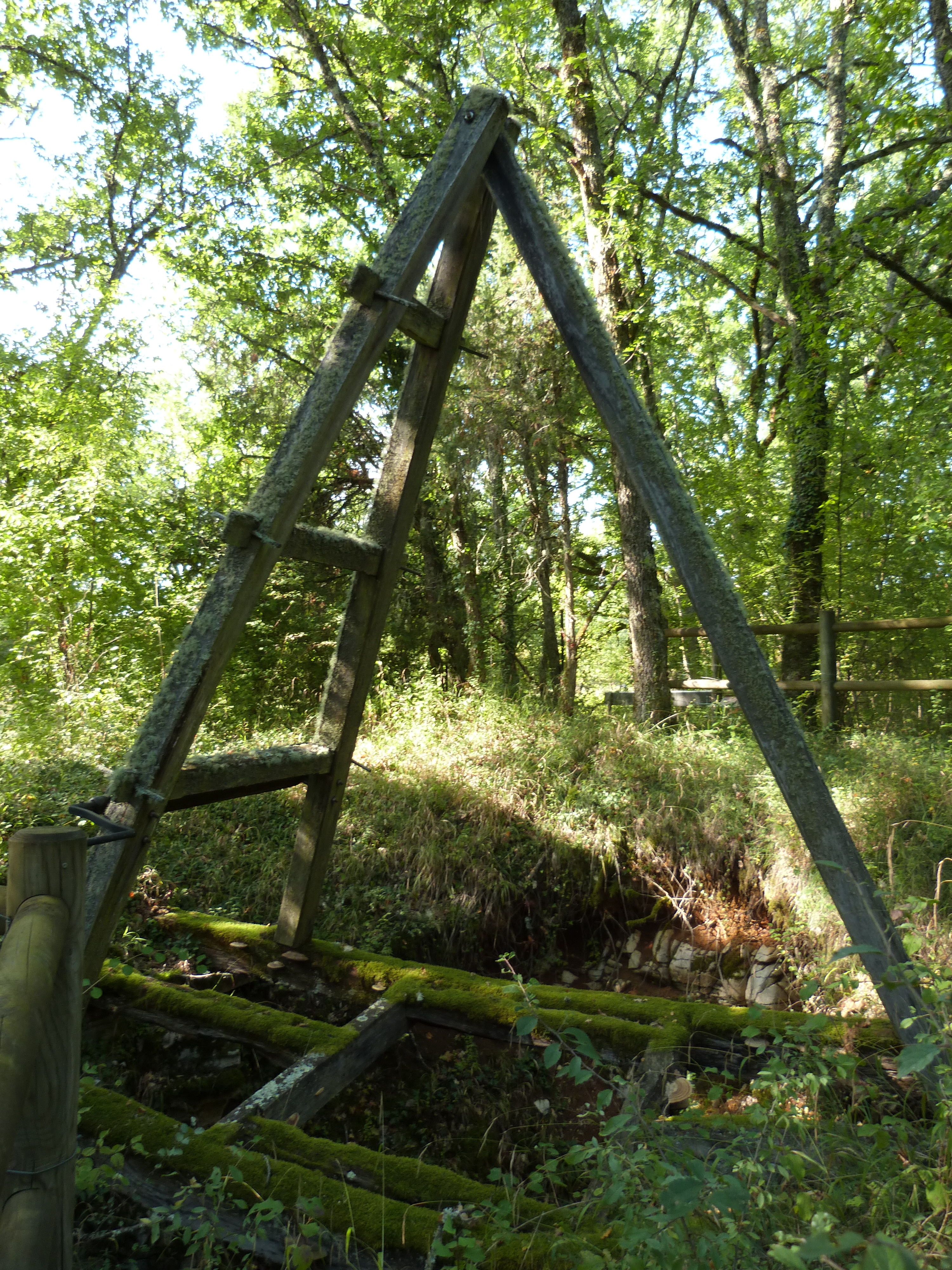 Phosphatière du Cloup d'Aural (Inscrit) .